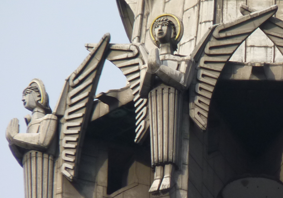 Engel am neuen Vierungsturm von 1959–1962 von Dombildhauer Erlefried Hoppe (1910–1992). Art déco. Die acht Engel sollen 4,10 m hoch sein, je 2,25 t wiegen und aus bleiverkleidetem Lärchenholz bestehen.